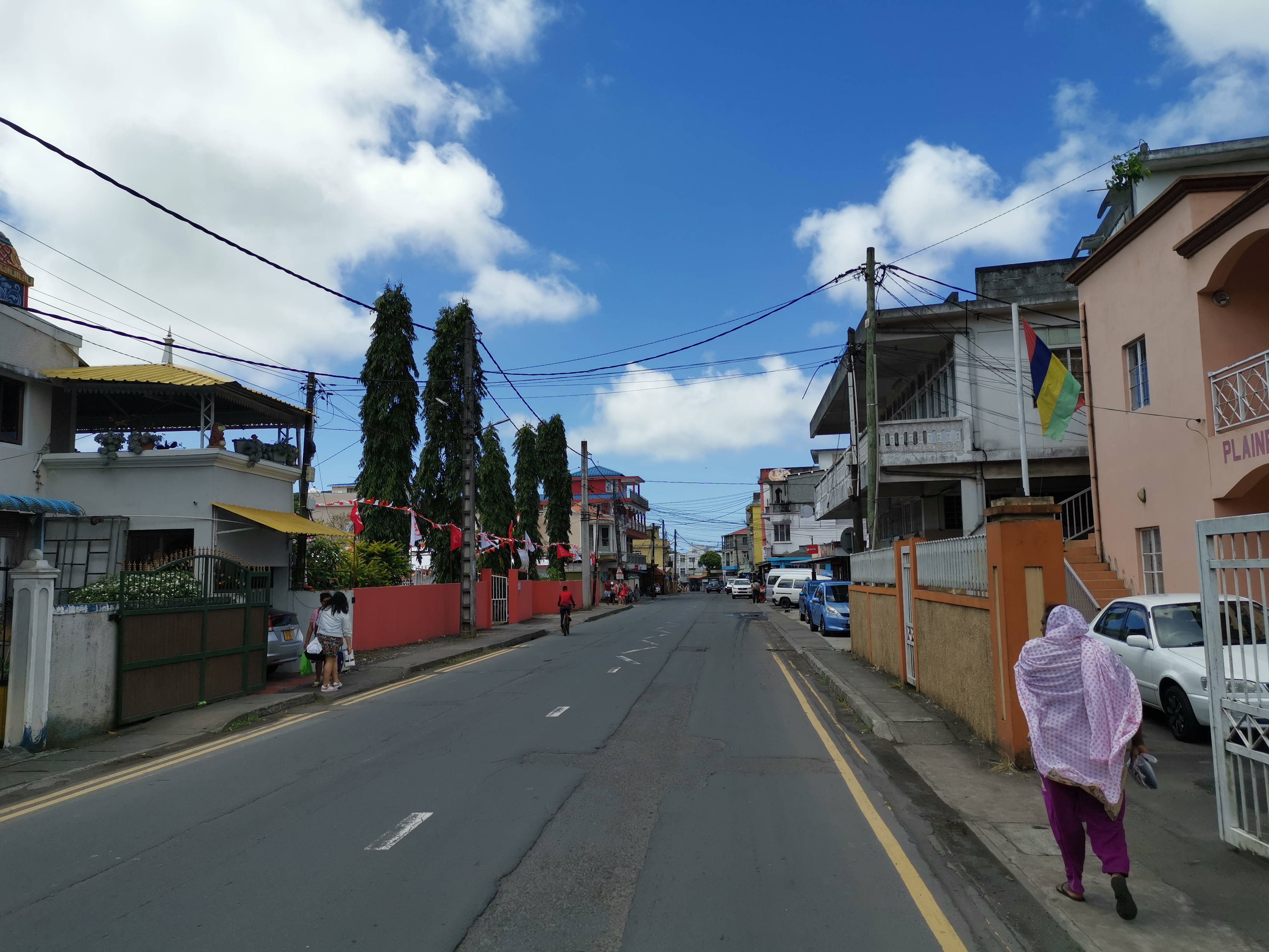 Straße in Plaine Magnien in Mauritius